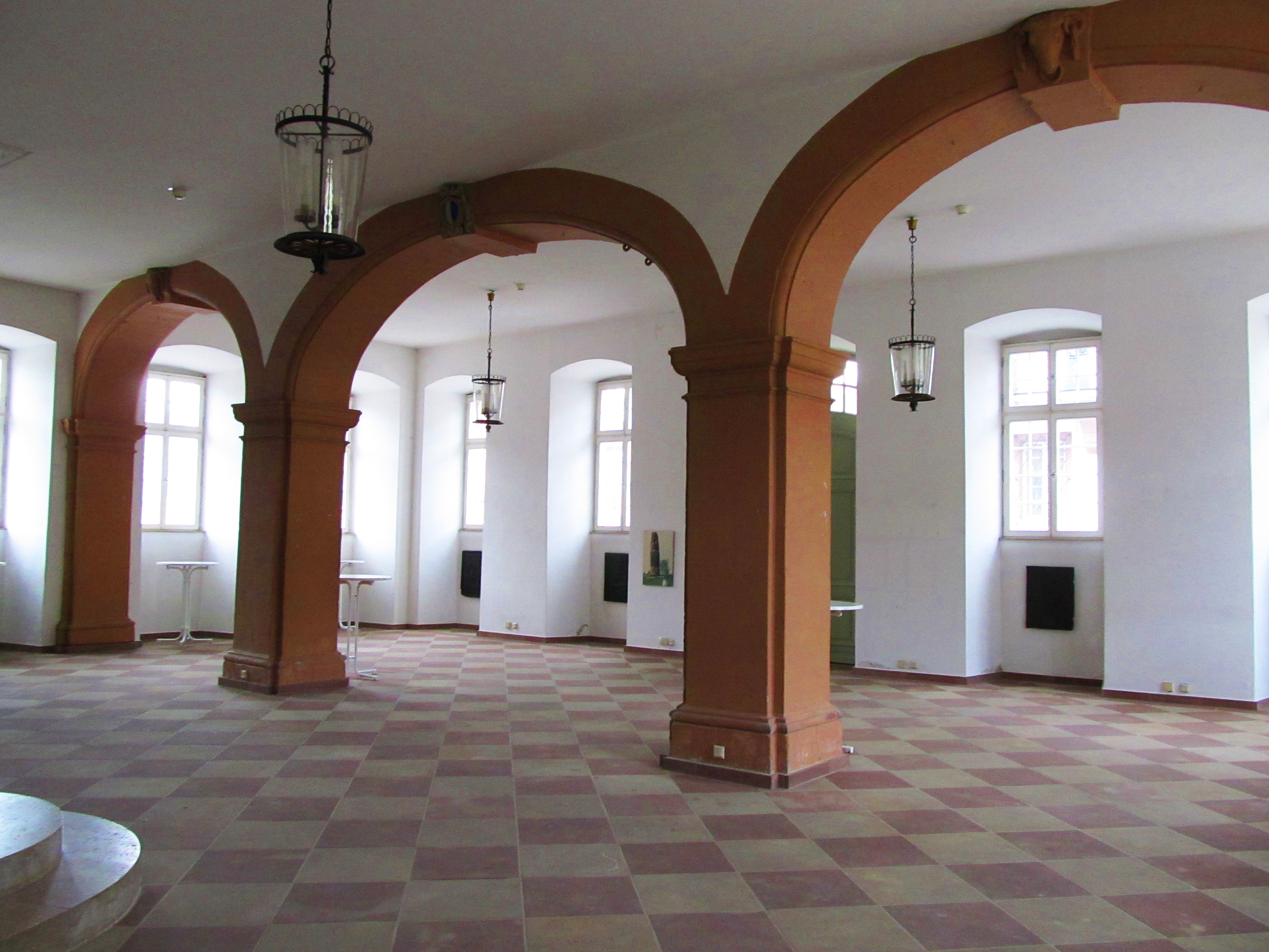 Blick in die ehemalige Markthalle im Rathaus Blieskastel, Saarland